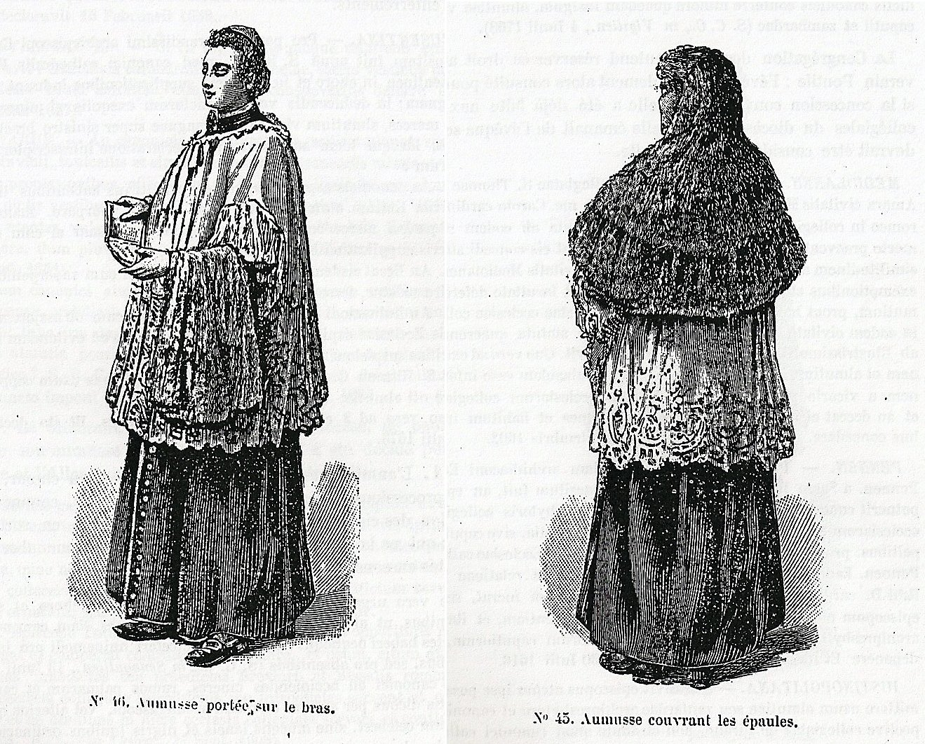 Différentes manières de porter l'aumusse. Gravure extraite de : Le costumes et les usages ecclésiastiques selon la tradition romaine, par Xavier Barbier de Montault, Paris vers 1880